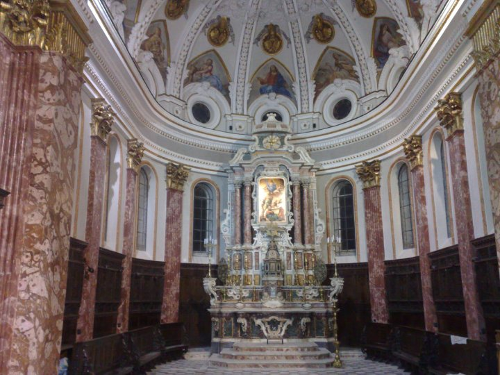 Abside del Duomo